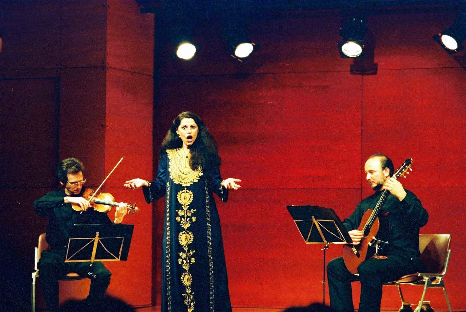 El Trío Sefarad actuando en Oviedo.